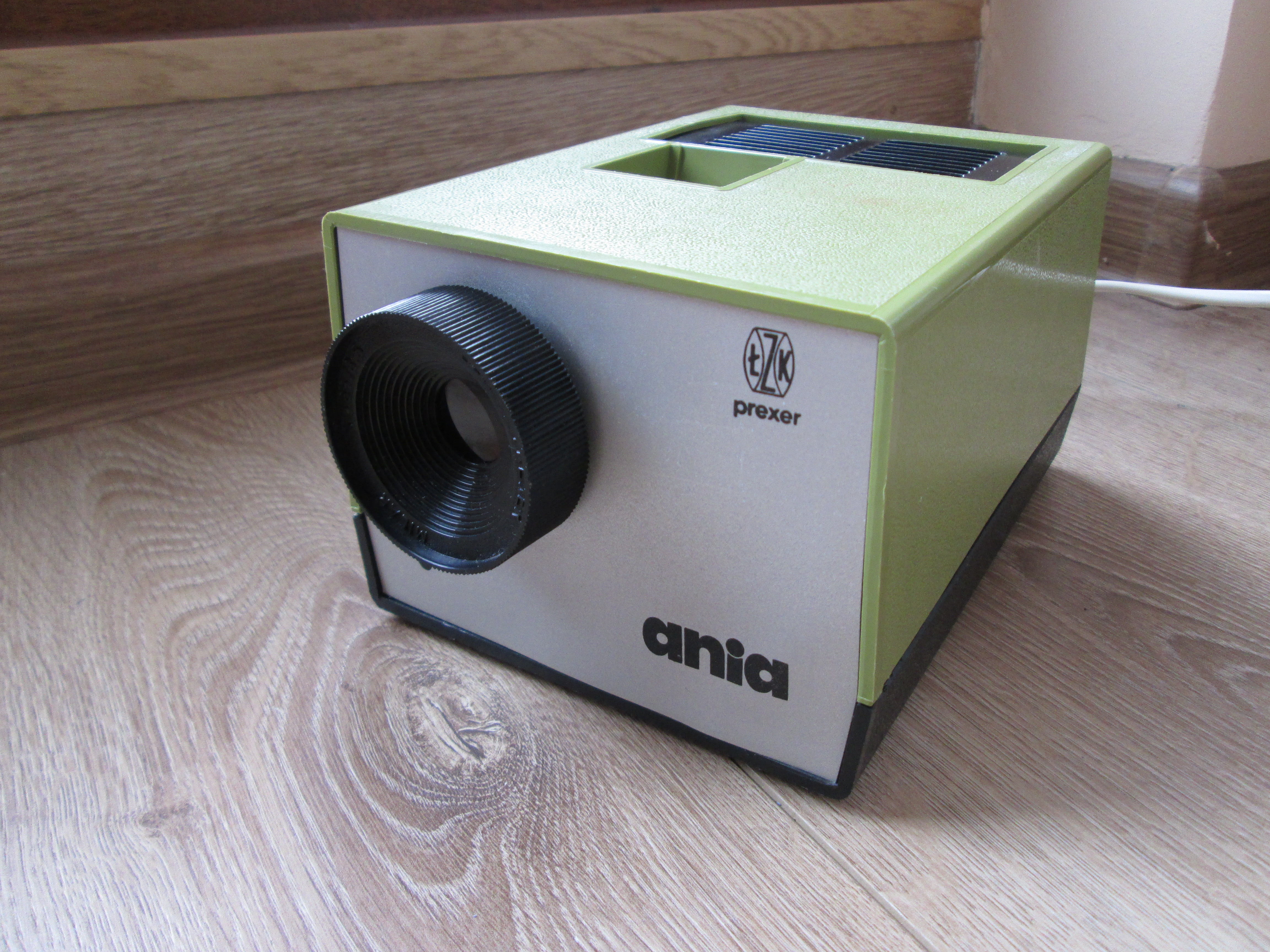 Rzutnik B-9 "Ania" produkcji Prexer